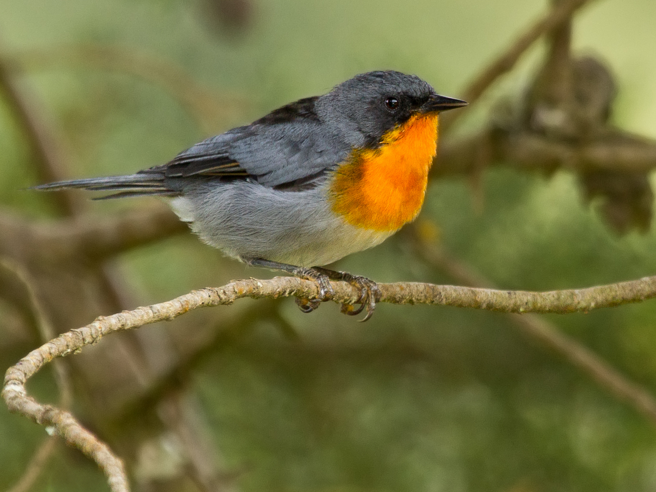 Endemic from Costa Rica and Panama, Cerro de la Muerte, Costa Rica